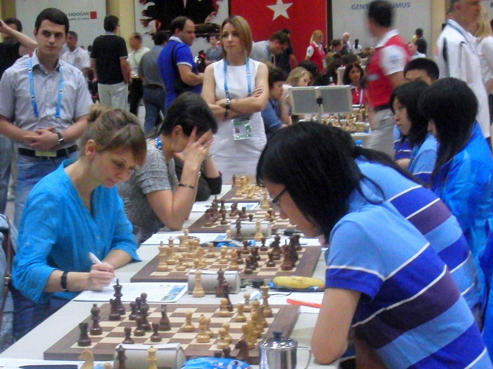 Russland - China, Schacholympiade 2012 in Istanbul. Links sitzt Nadezhda Kosintseva am zweiten Brett, rechts Hou Yifan am ersten Brett.